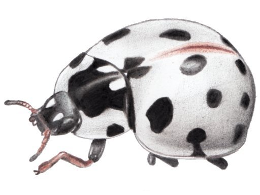 Coccinelle à quinze points Dessin effectué d'après une photographie.